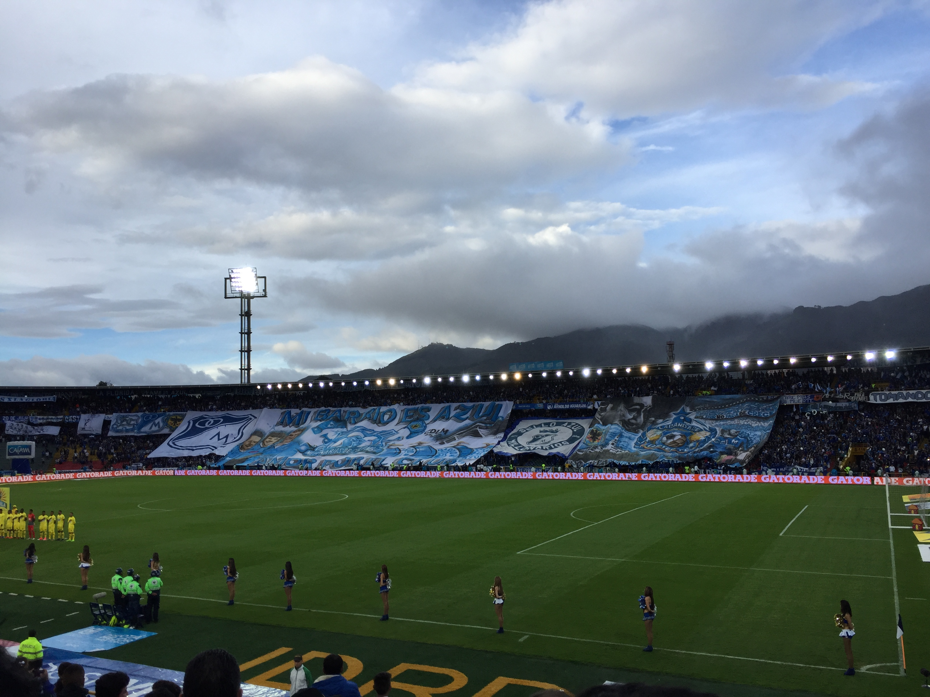 Millonarios F.C